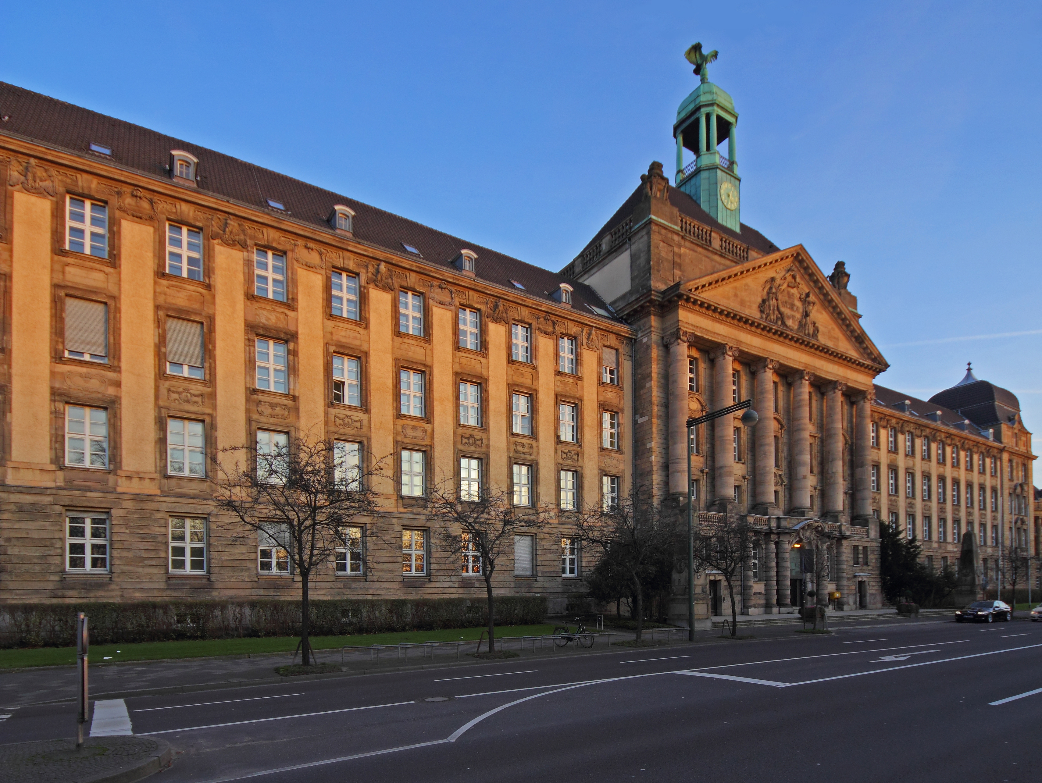 Dienstgebäude der Bezirksregierung Düsseldorf an der Cecilienallee